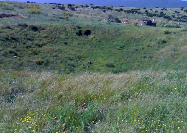 Anfiteatro Sisapo.